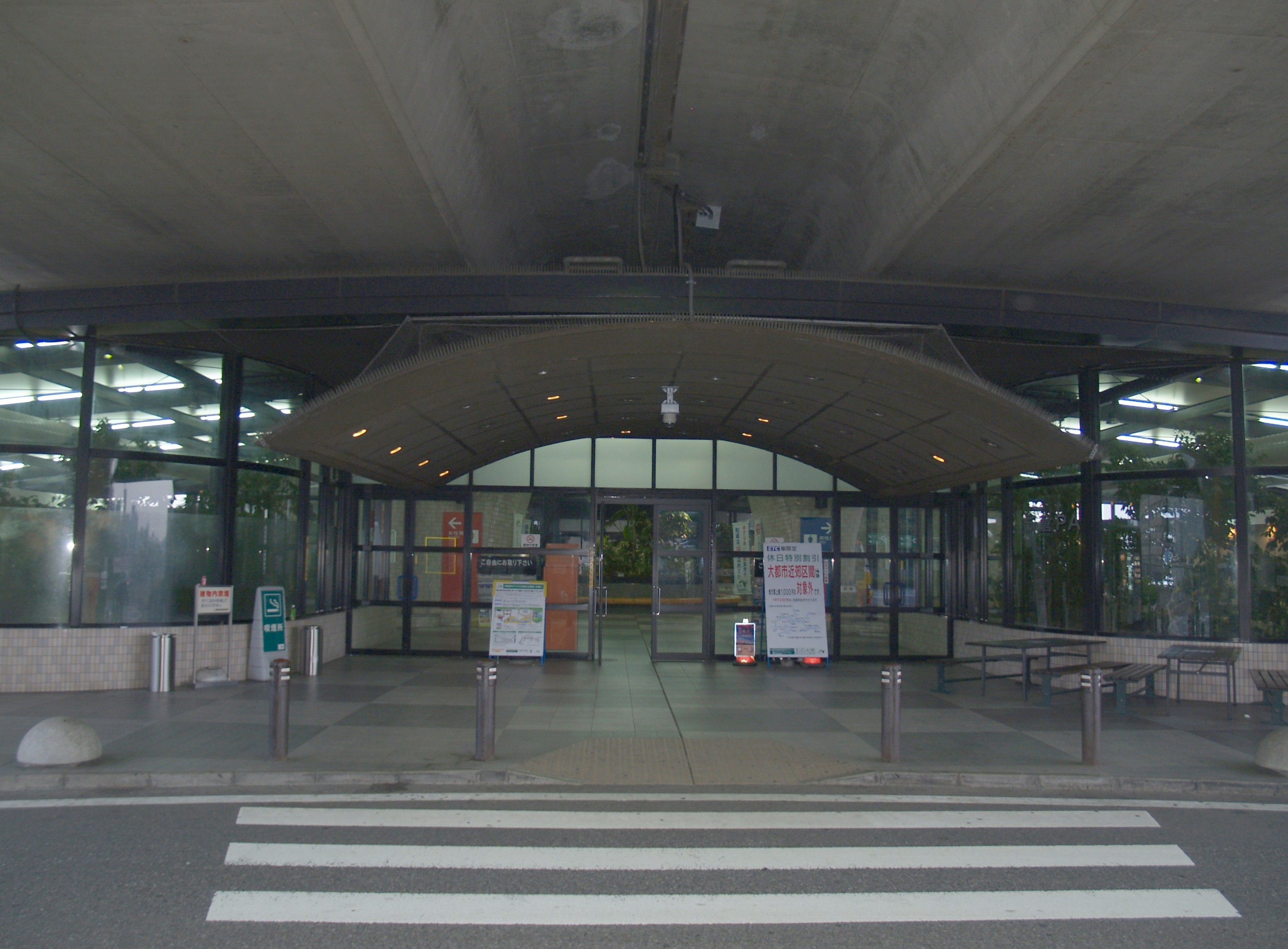 新倉パーキングエリア